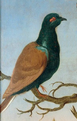 Hoflößnitz, Eckhout: Bild 45: St.-Thomas-Grüntaube = Sao-Thomè-Grüntaube (Treron sancithomae), Ausschnitt